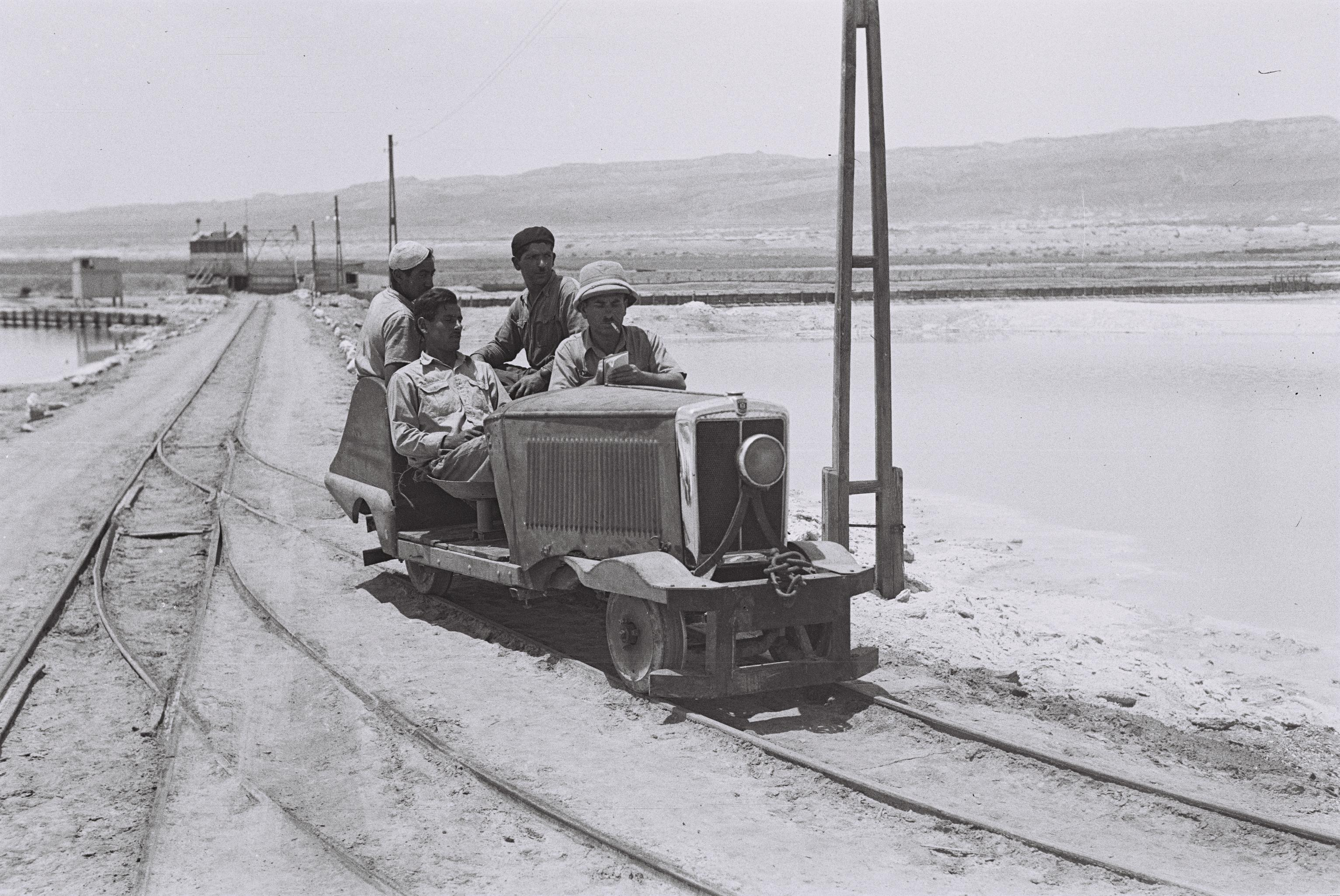 WORKERS DRIVING TO THE EVAPORATION POOLS AT THE SDOM POTASH FACTORY IN THE DEAD SEA. עובדים נוסעים לבריכות האידוי במפעל אשלגן ליד ים המלח